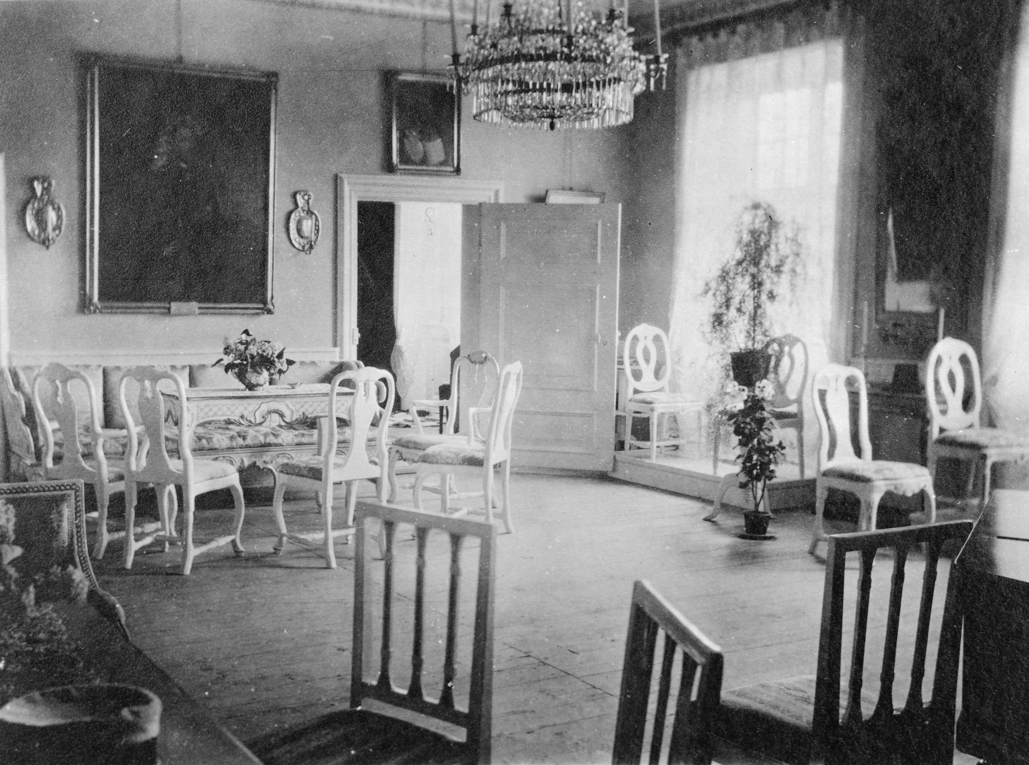 Naantalin Lapilan kartanon sali vuonna 1914. Kuvatietoja: Organisaatio: Museovirasto - Musketti Kokoelma: Historian kuvakokoelma Inventaarionro: HK19700421:32 Mitat: 9 x 12 cm Kuvaustiedot: 1914 Lapilan kartano,Naantali Kuvaaja: Sigmund Schalin